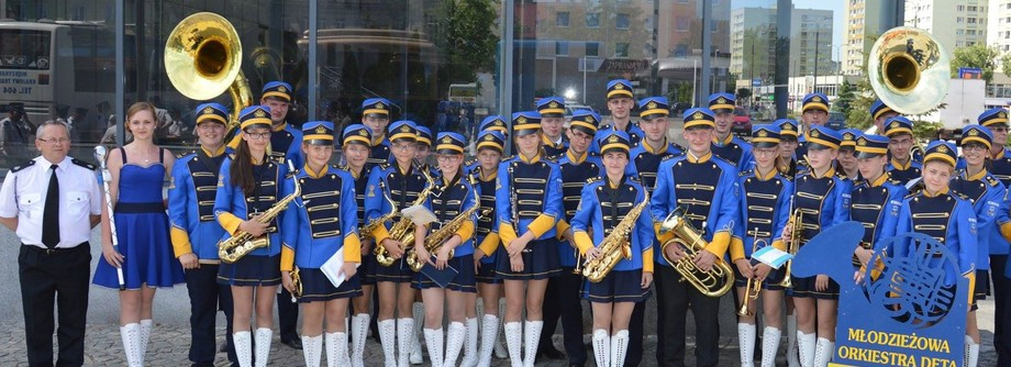 Orkiestra w 2015r.